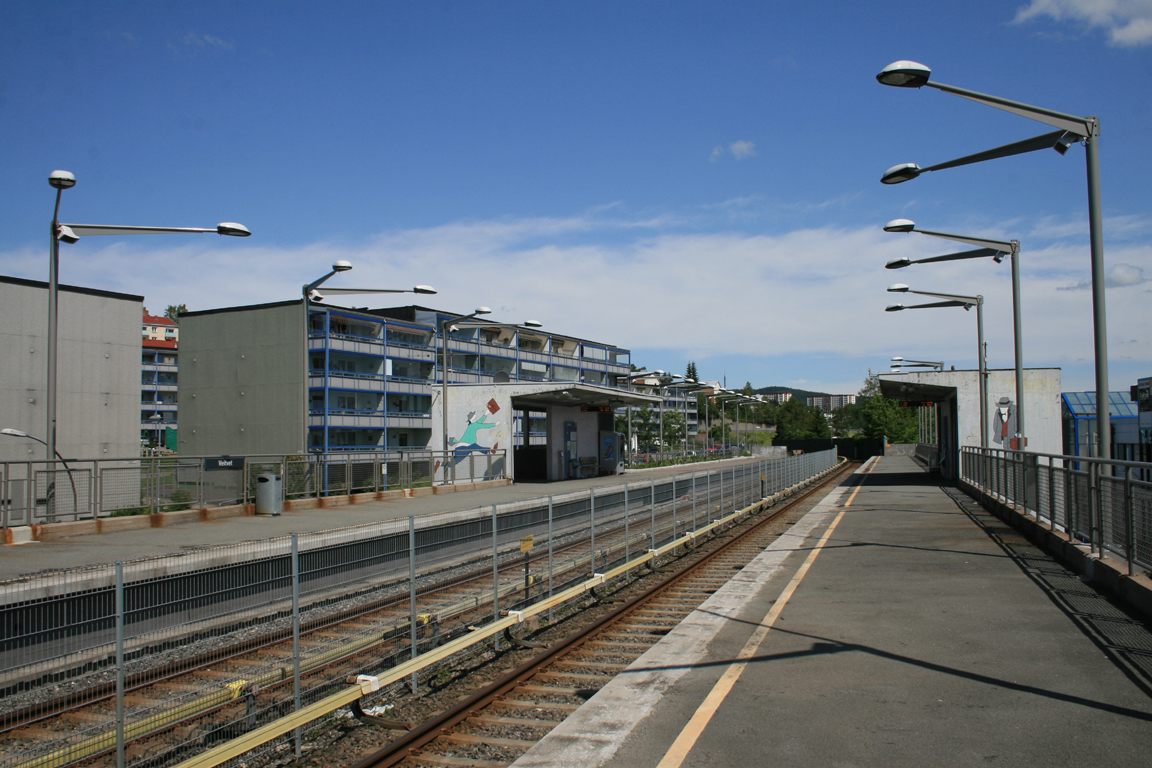 Veitvet T-banestasjon fra plattformen mot Rødtvet. Stasjonen er noe oppgradert ja, men fortsatt like sjuskete fordet. Desverre.